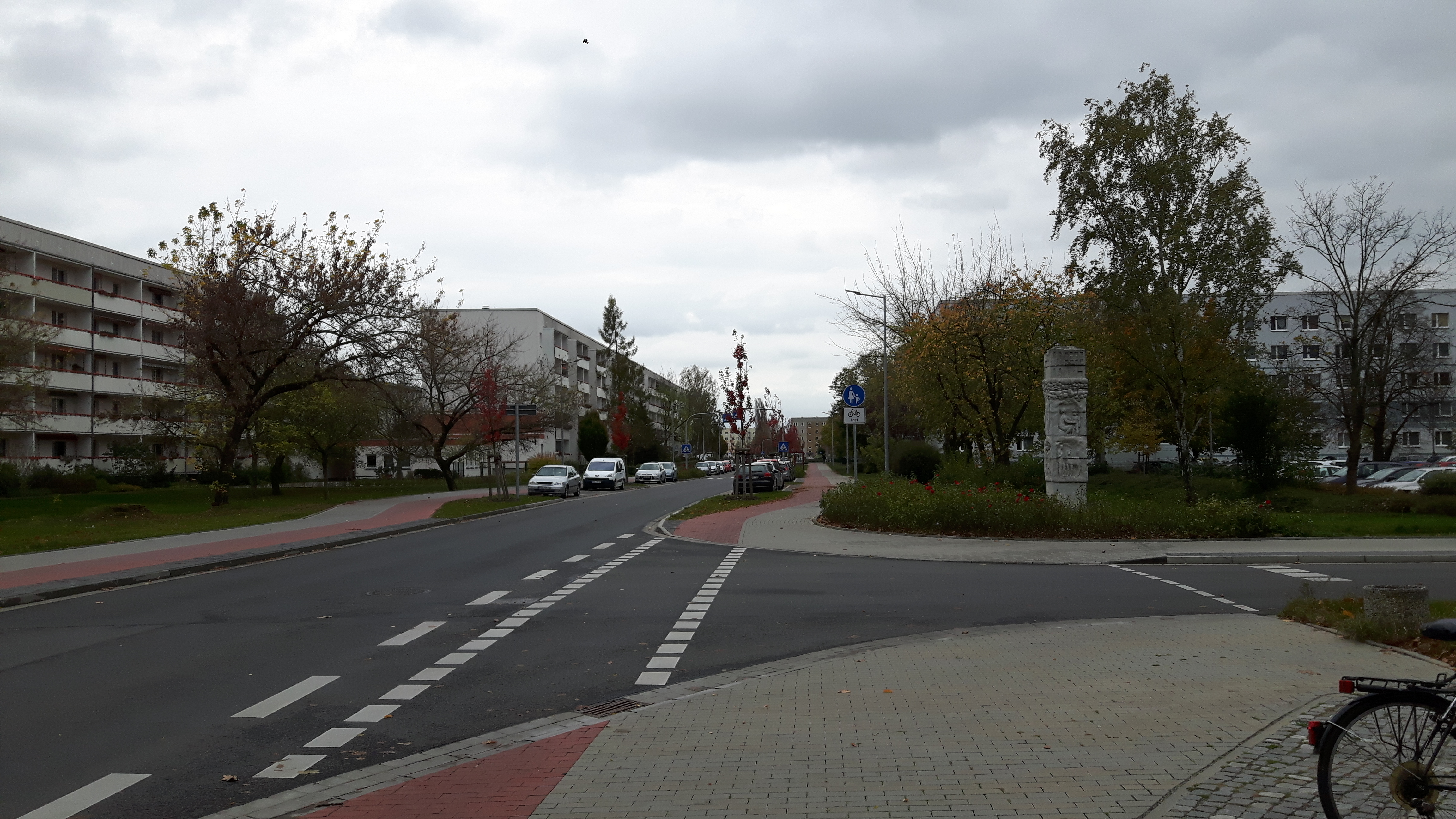 Geschwister-Scholl-Straße